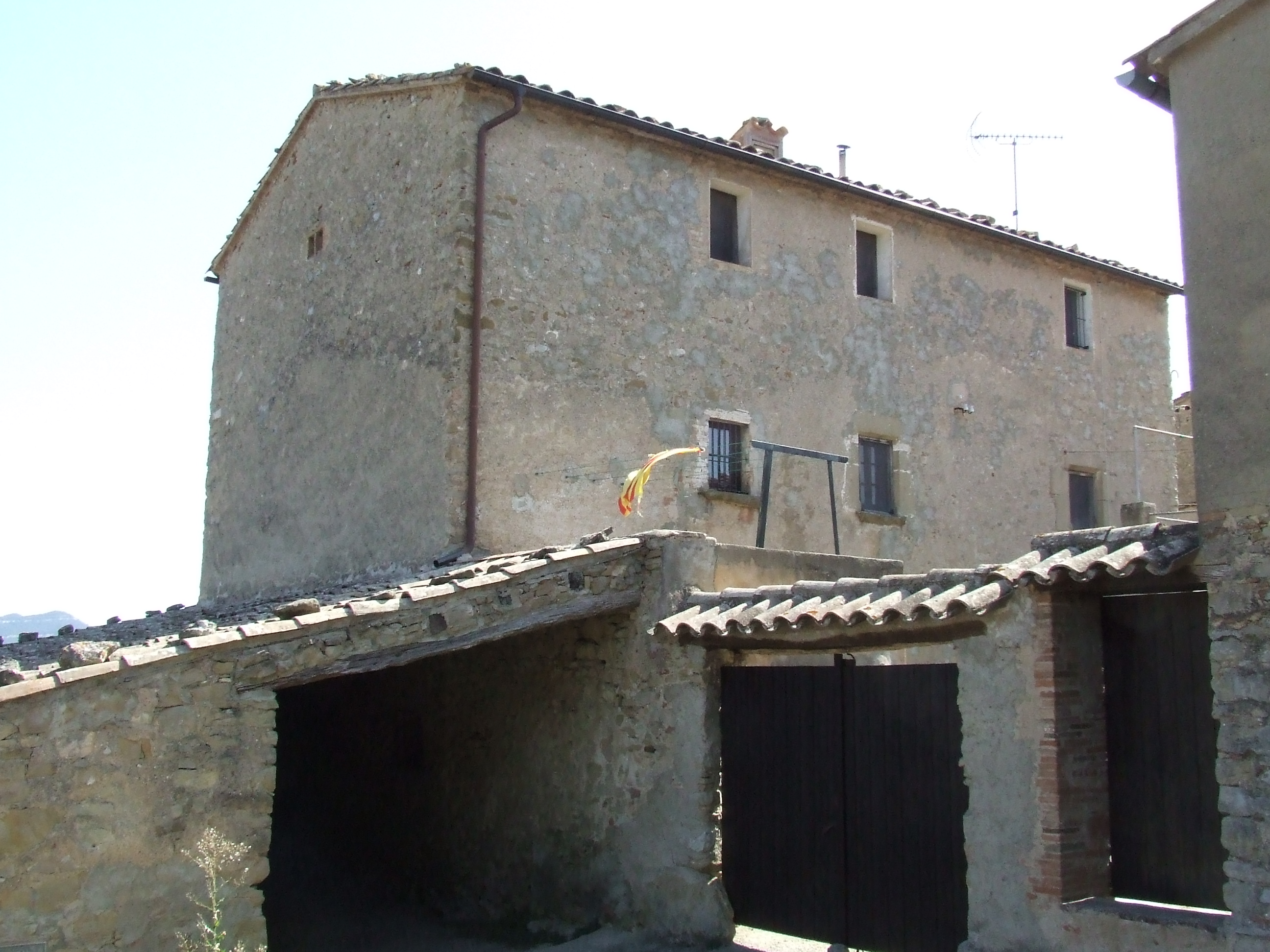 El Mas Torroella (Castellcir, Moianès)